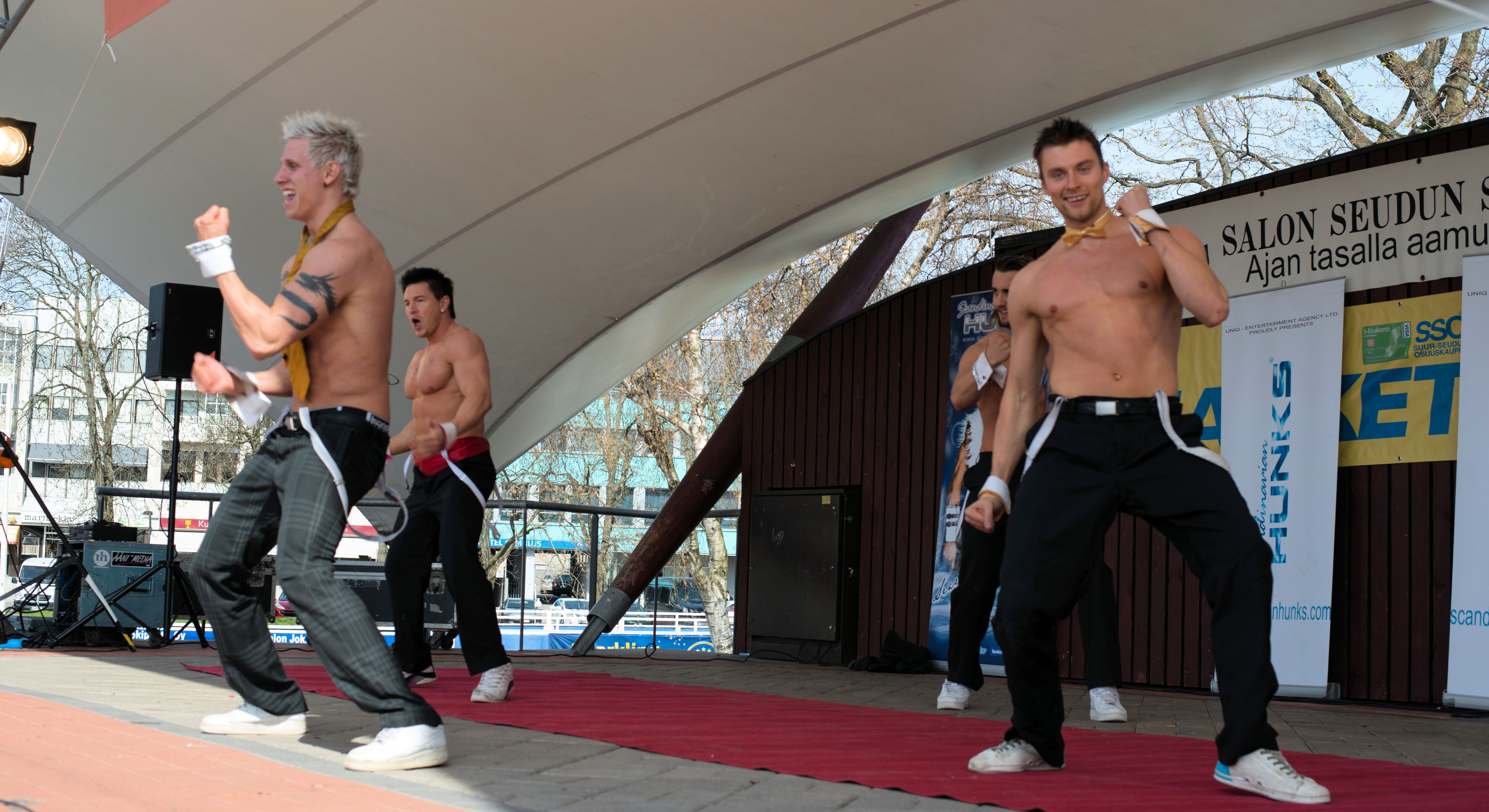 Scandianavian Hunks, suomalainen tanssiryhmä